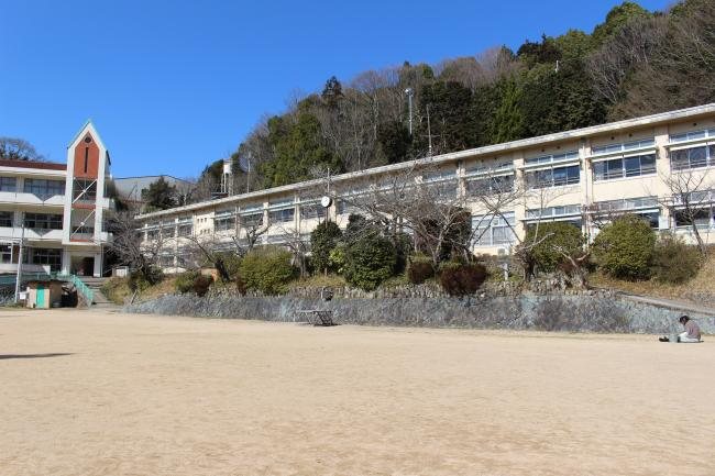 学校の様子